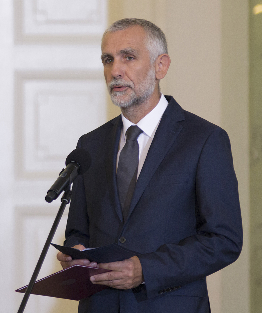 Zaprzysiężenie rządu Ewy Kopacz